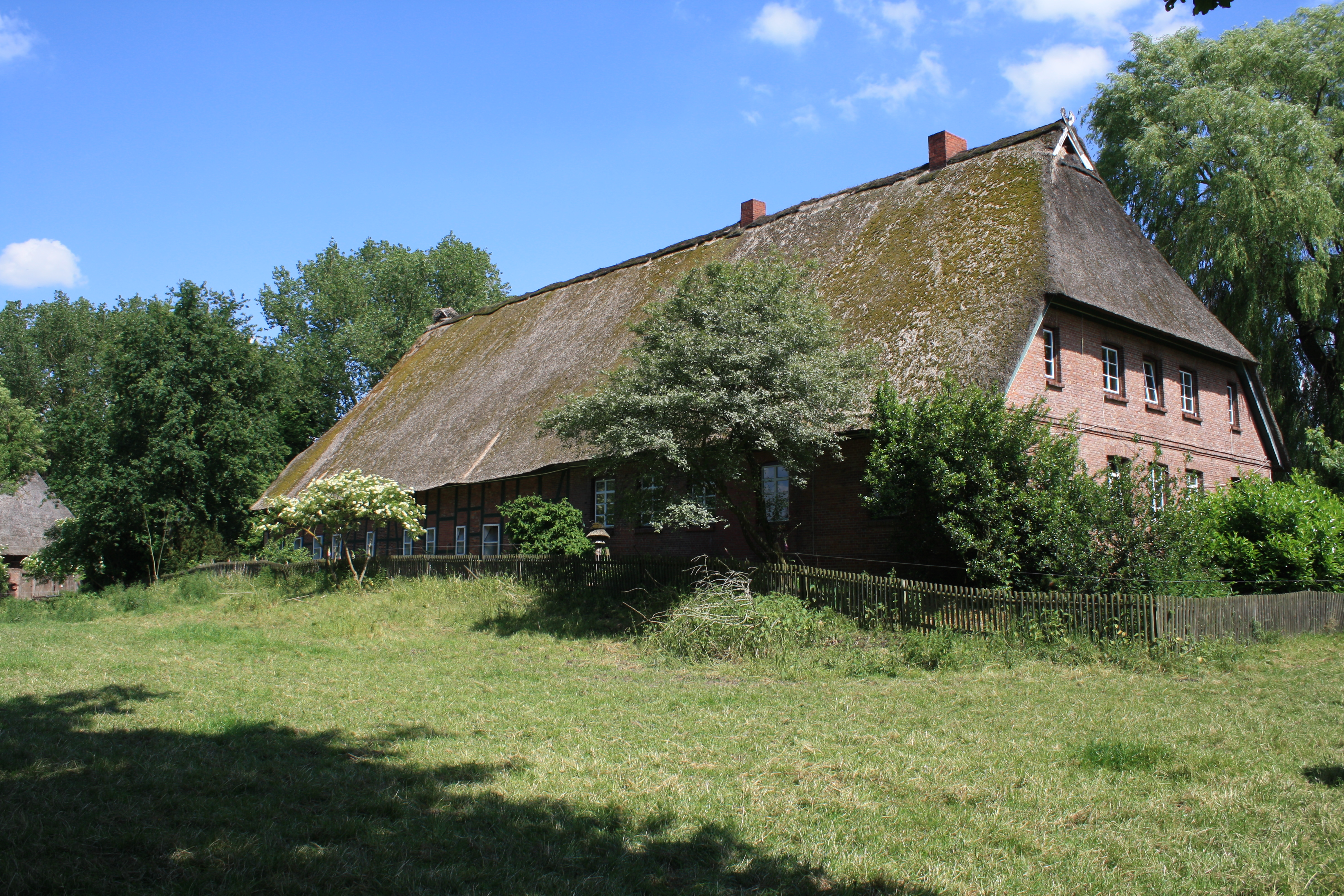 Baudenkmal/Bodendenkmal Birnenallee 3: Hofanlage mit Pflasterung und Scheune auf Warft